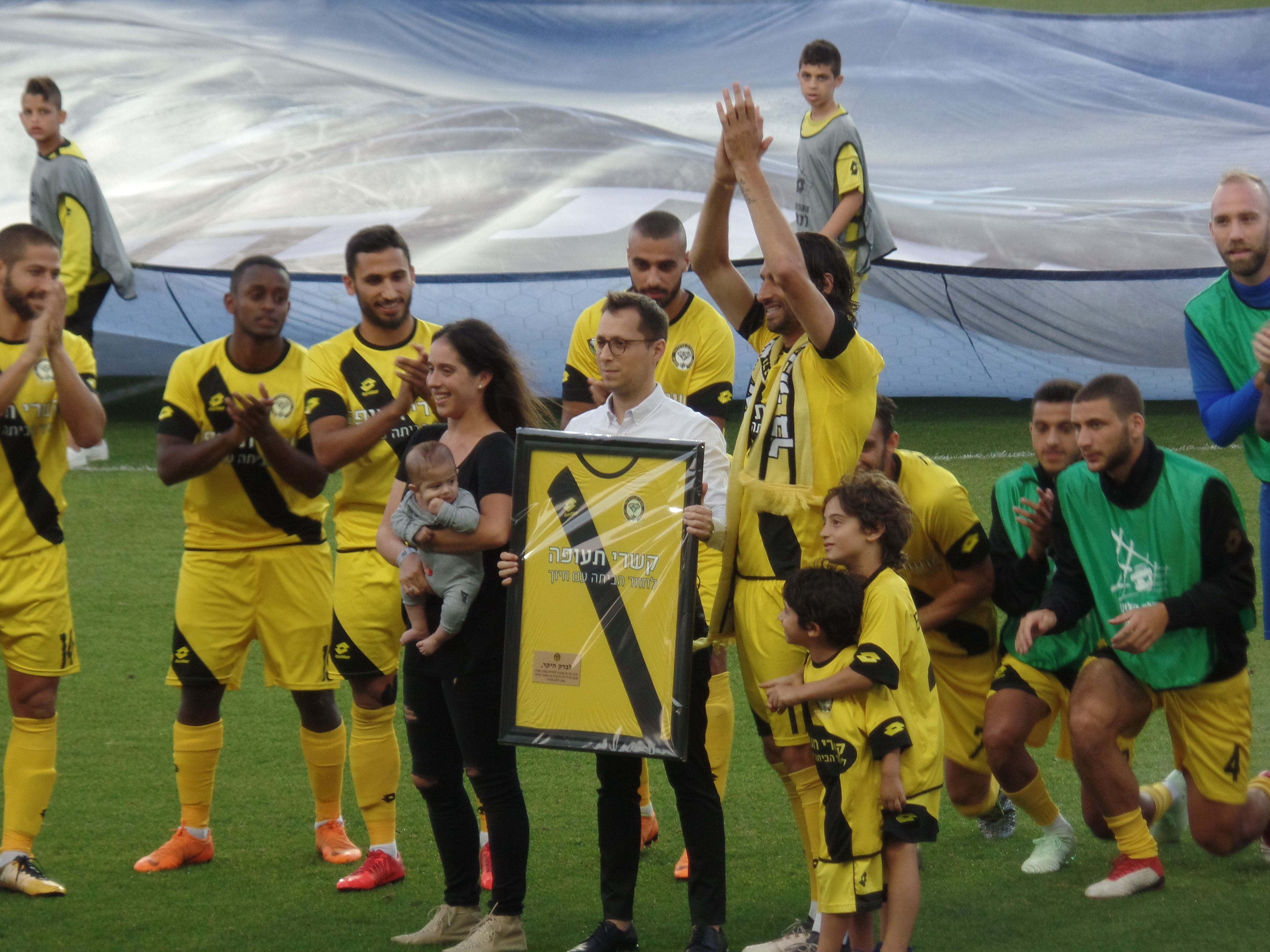 טקס הפרישה של ברק בדש ממשחק פעיל